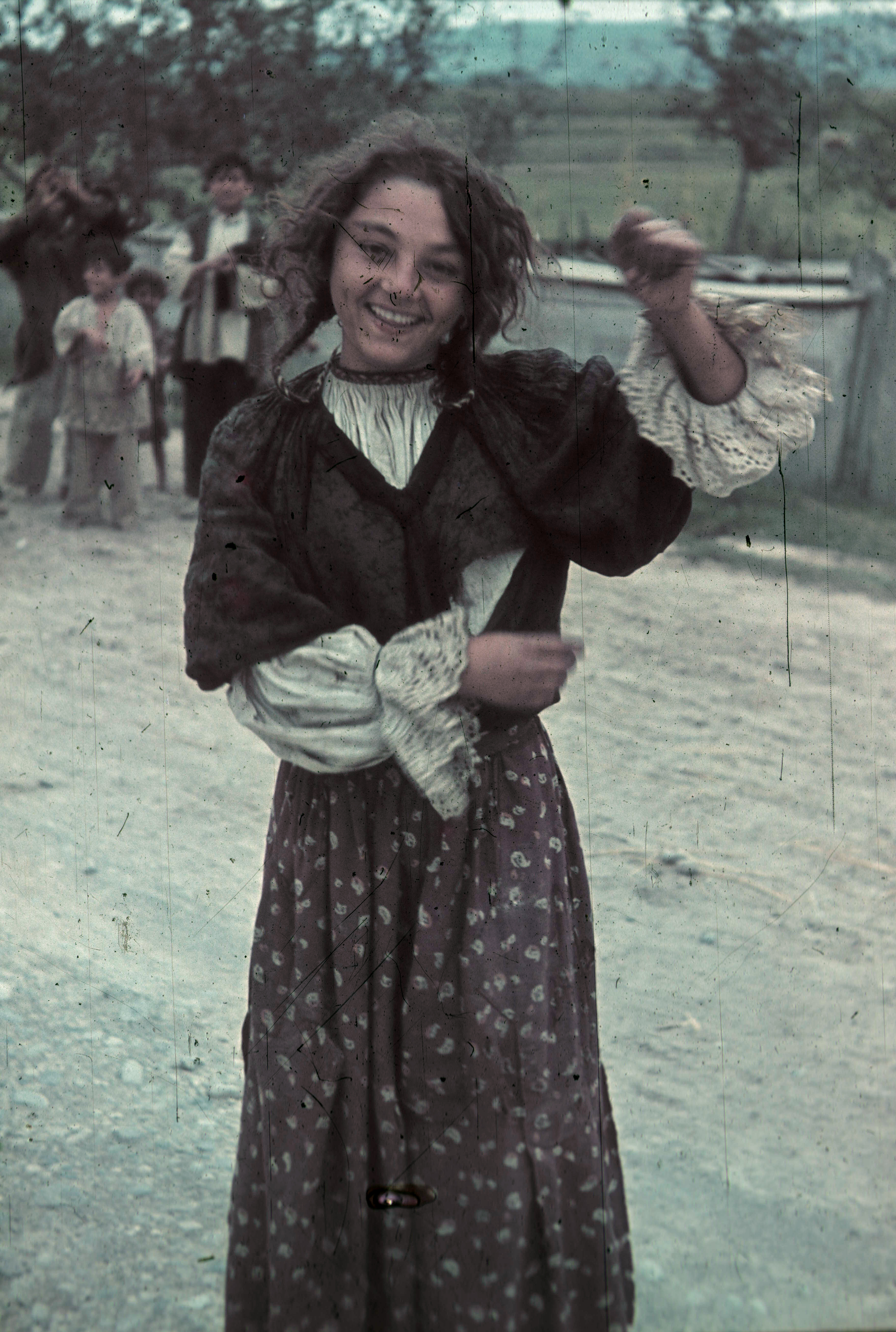 Hungary, Gypsy (Agfacolor) Tags: gypsy, girl, colorful